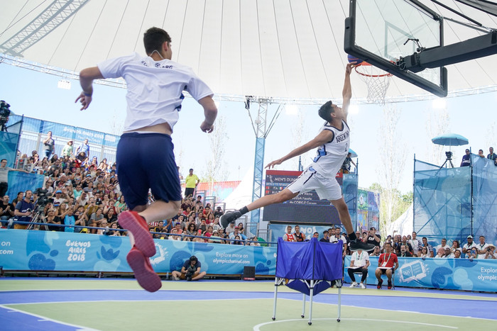 Fausto Ruesga - Medalla de Oro - Concurso de Volcadas - Juegos Olímpicos de Buenos Aires 2018